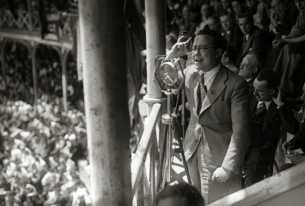 Título original: Discurso de Santiago Carrillo en la plaza de toros de Tolosa (1/3) Localización: Tolosa (Guipúzcoa)